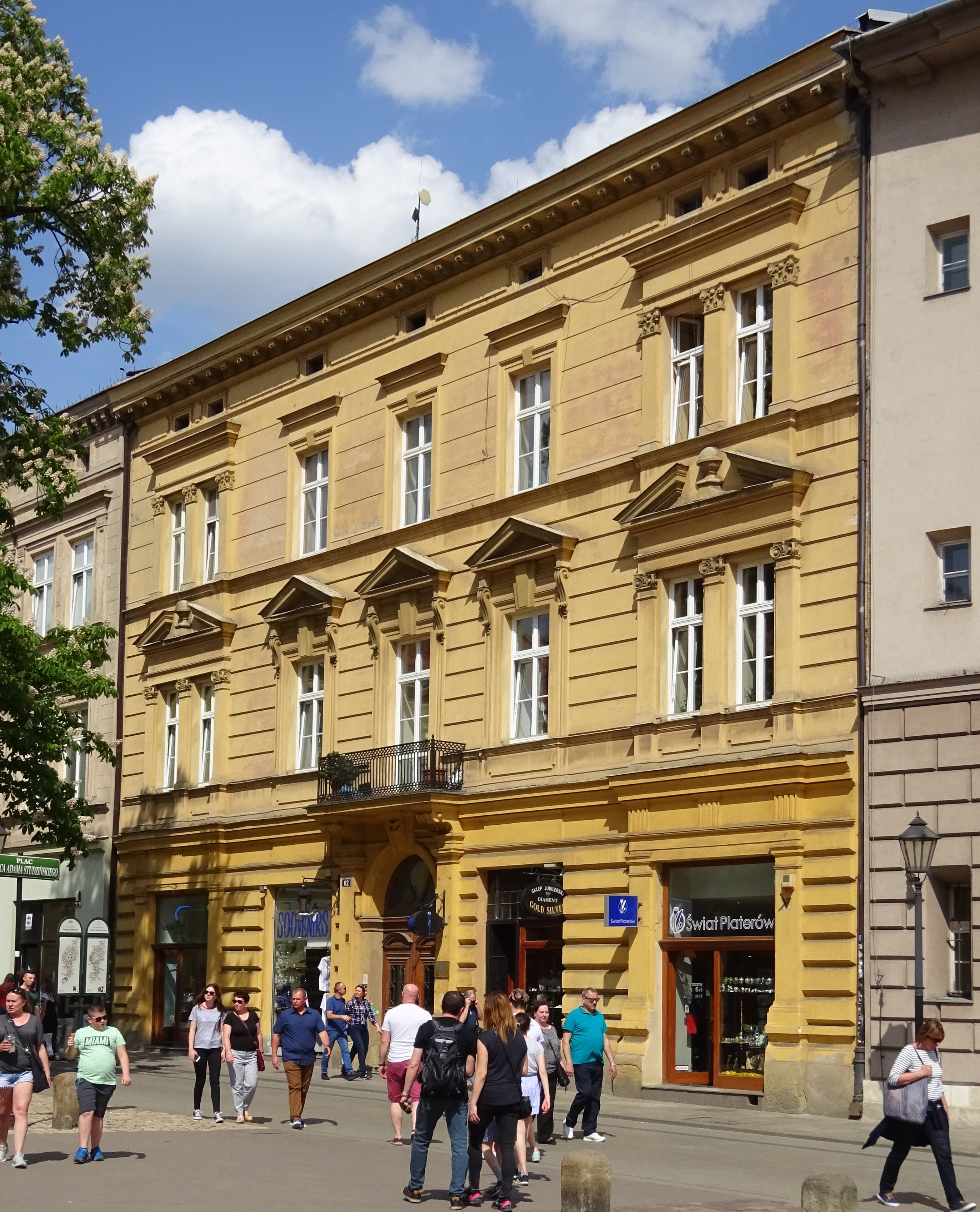 Kamienica Karmelitanek w Krakowie przy ulicy Grodzkiej 62. 2018